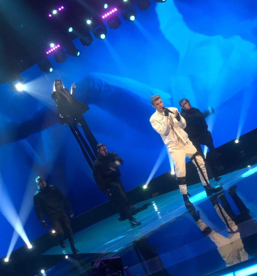 Наступ Андрије Јо на Беовизији 2020.